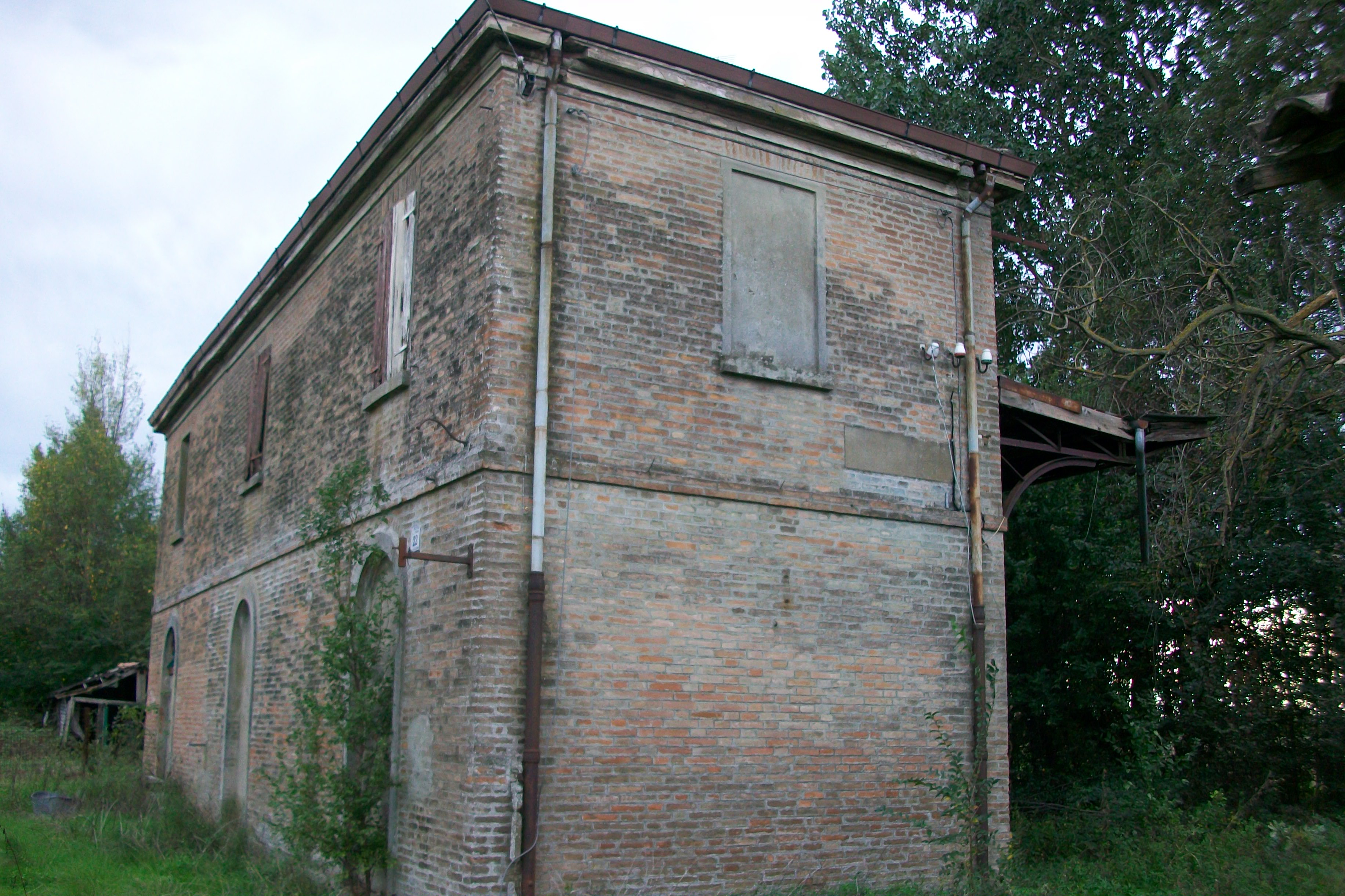 ex-stazione di Staggia sulla linea dismessa Modena-Mirandola